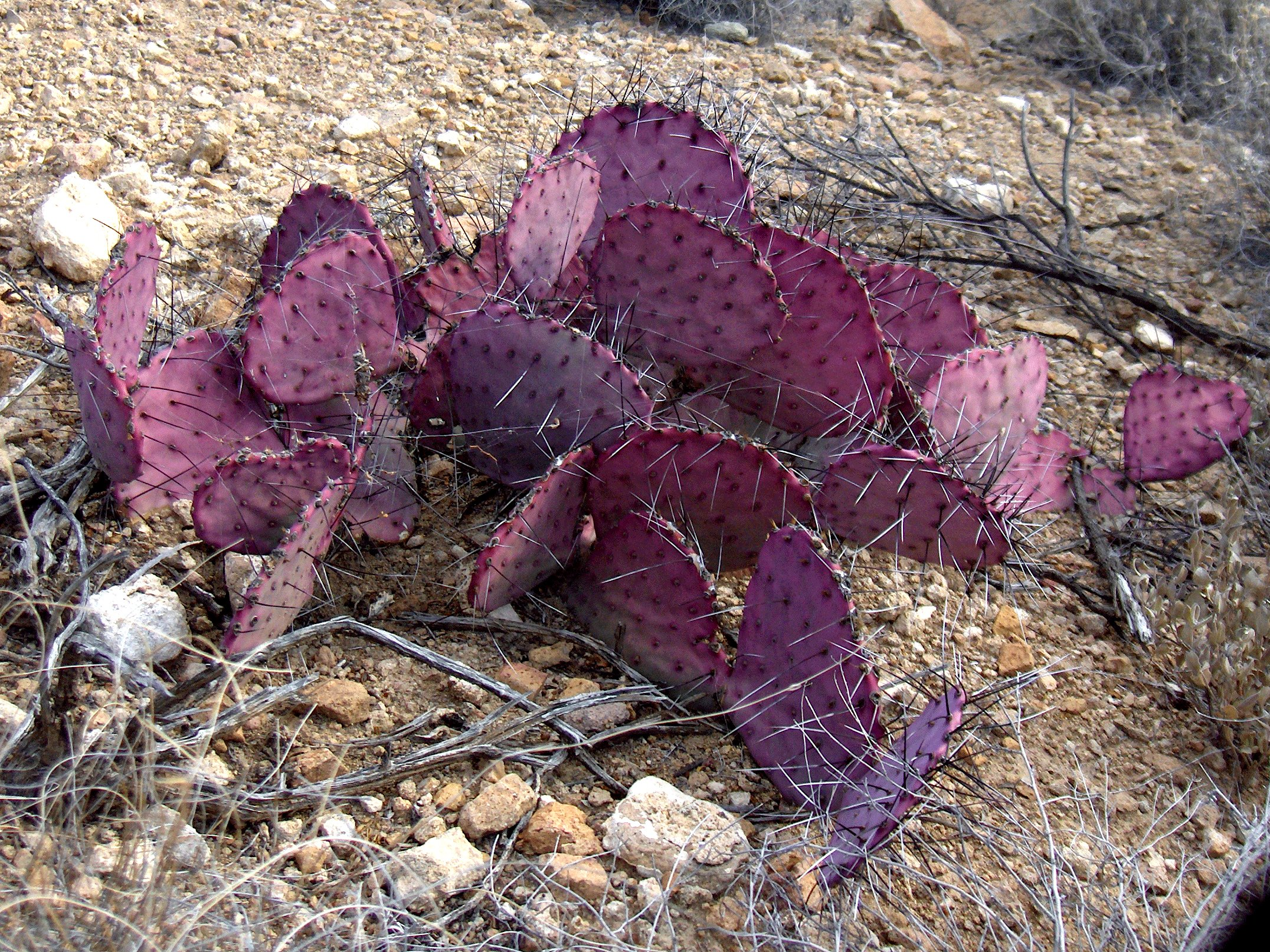 in Big Bend National Park